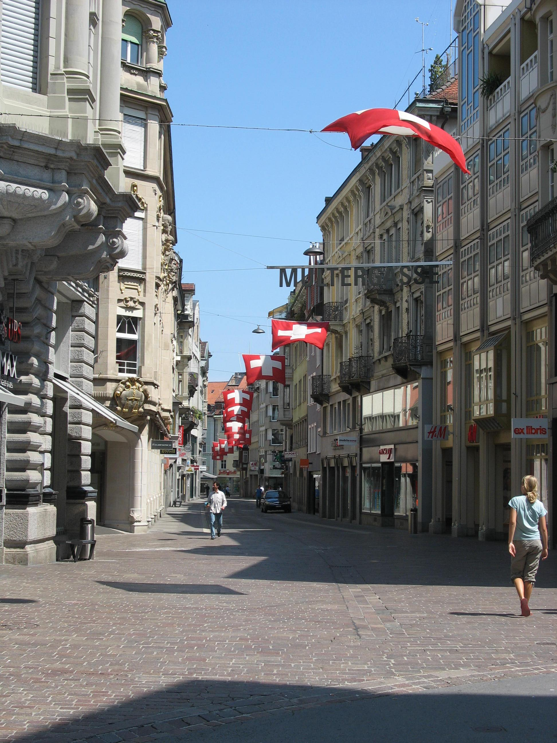 Schweizerflaggen in der Multergasse in St. Gallen, 2 Tage vor dem Nationalfeiertag.